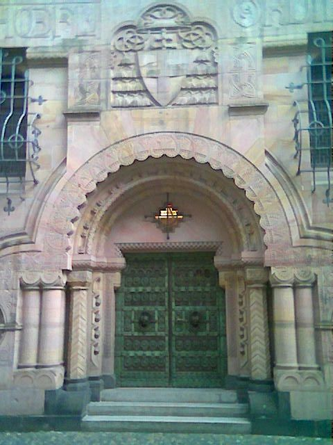 Erzbischöfliches Ordinariat des Erzbistums Freiburg im Breisgau, Eingang. Architekt: Raimund Jeblinger (1853-1937)